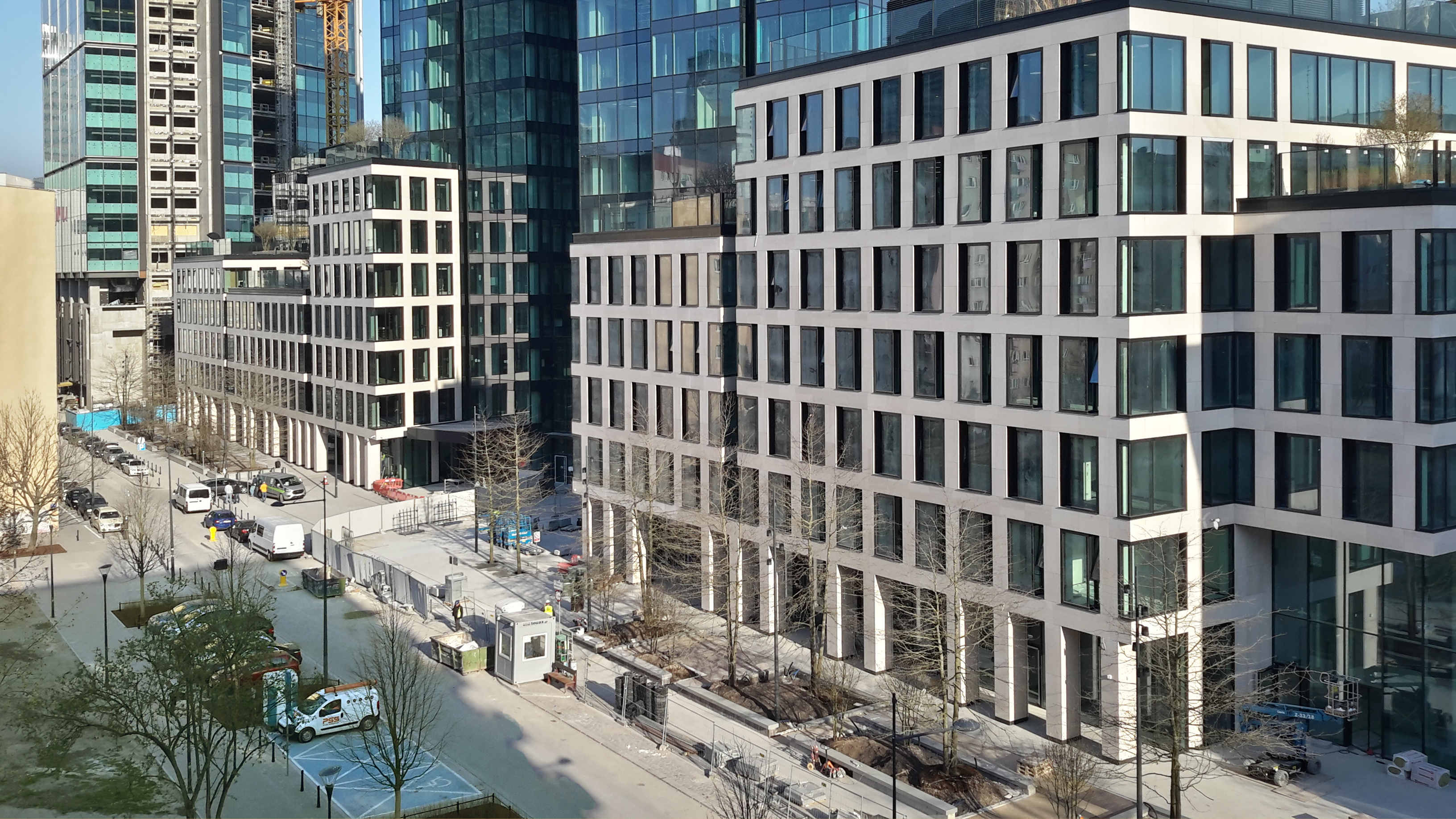 Widok od strony ulicy Chmielnej ok. godz. 17.15